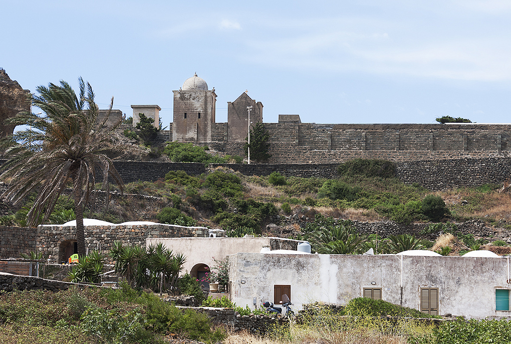 Insel Pantelleria, Provinz Trapani, Sizilien